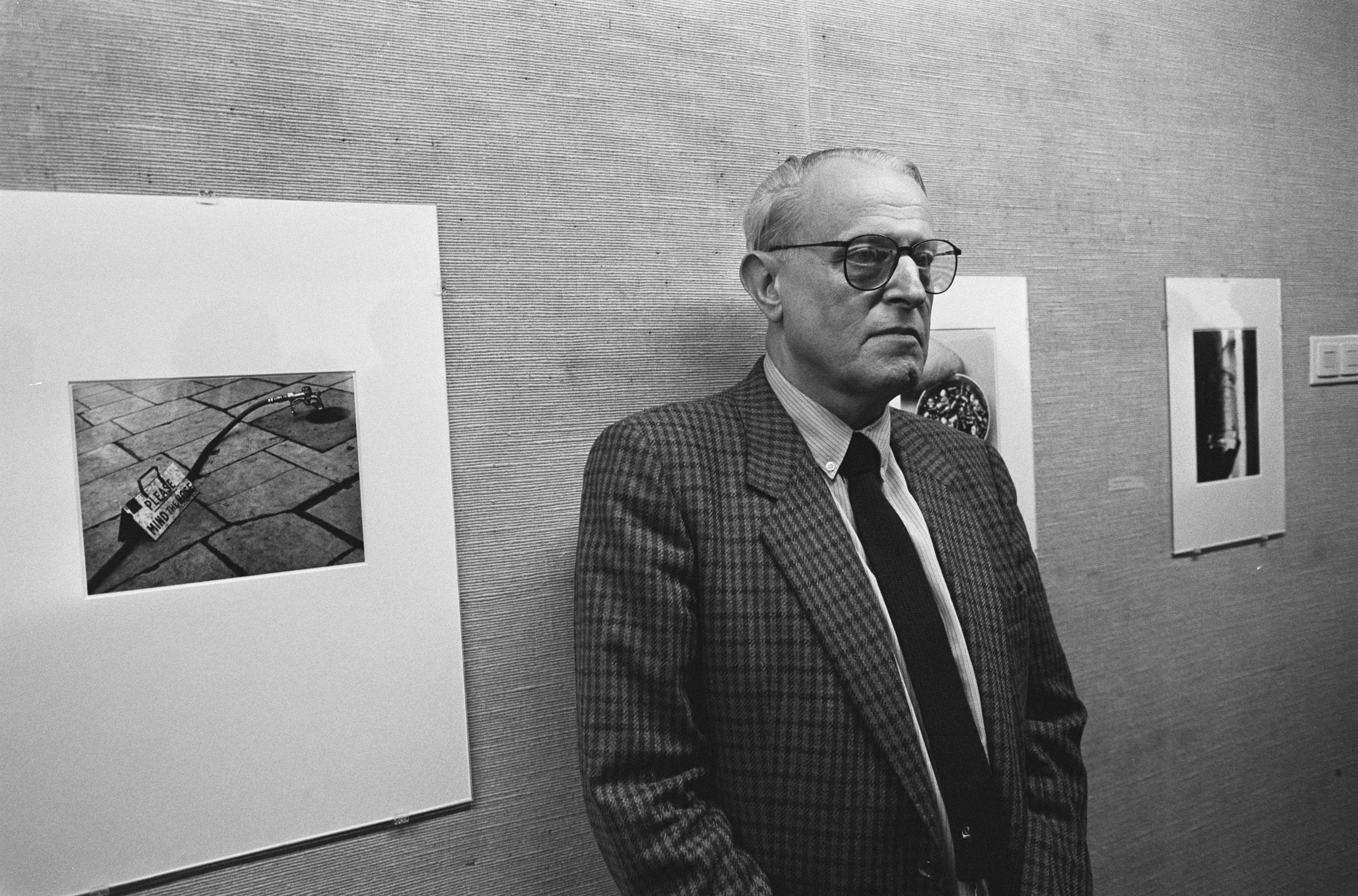 Collectie / Archief : Fotocollectie Anefo Reportage / Serie : [ onbekend ] Beschrijving : W. F. Hermans bij zijn fotos op 5 september jongst leden geopende fototentoonstelling in Stedelijk Museum (tevens opdracht "Knack") Datum : 8 september 1986 Trefwoorden : FOTOS, musea, tentoonstellingen Persoonsnaam : Hermans, W.F. Fotograaf : Gerrits, Roland / Anefo Auteursrechthebbende : Nationaal Archief Materiaalsoort : Negatief (zwart/wit) Nummer archiefinventaris : bekijk toegang 2.24.01.05 Bestanddeelnummer : 933-7516